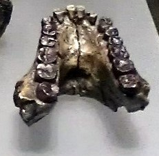 KNM-KP 29281. Mandible of Australopithecus anamensis. Cast at the Museo Nacional de Ciencias Naturales in Madrid (Spain)